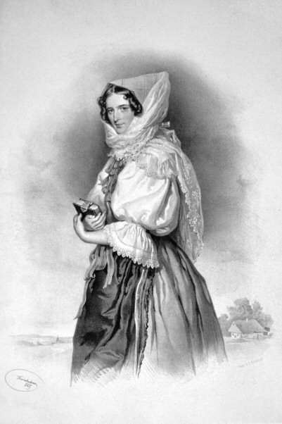 Franziska de Paula von Liechtenstein, geb. Kinsky (1813-1881), Fürstin. Lithographie von Josef Kriehuber, 1849